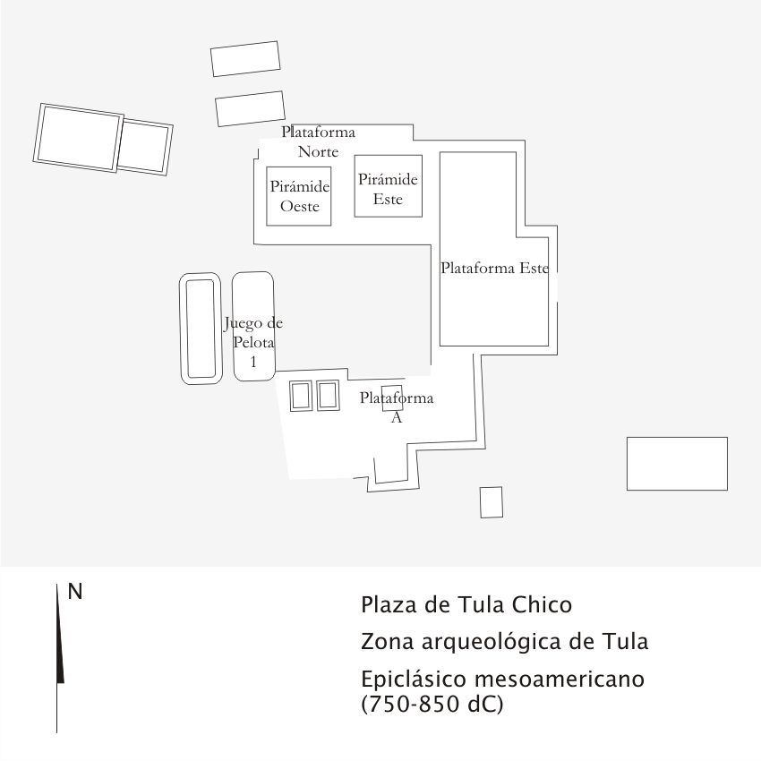 Plano del complejo arquitectónico de Tula Chico, en la zona arqueológica de Tula (México)